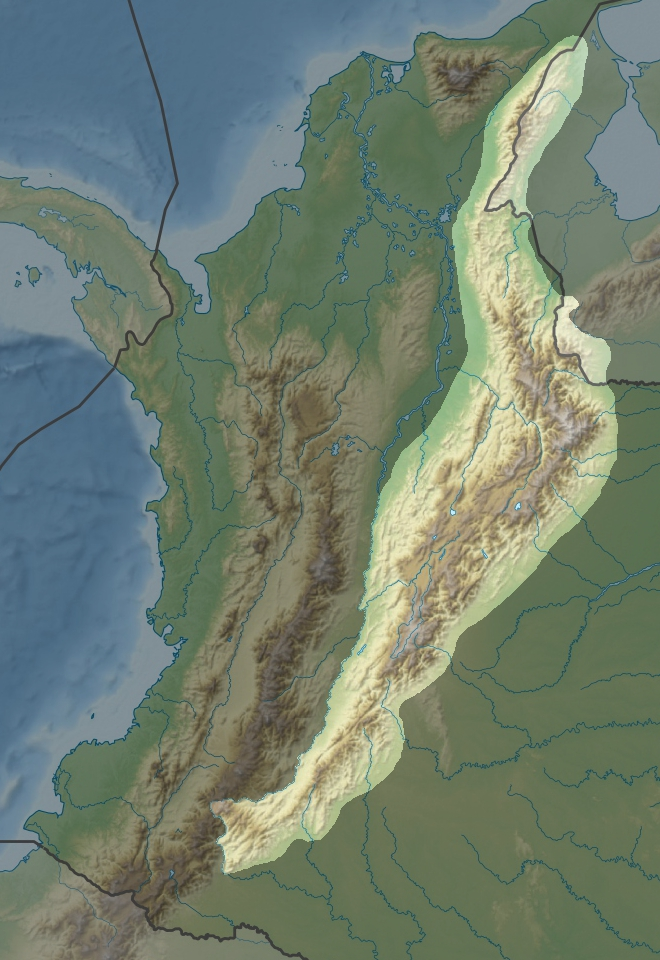 Cordillère Orientale en Colombie